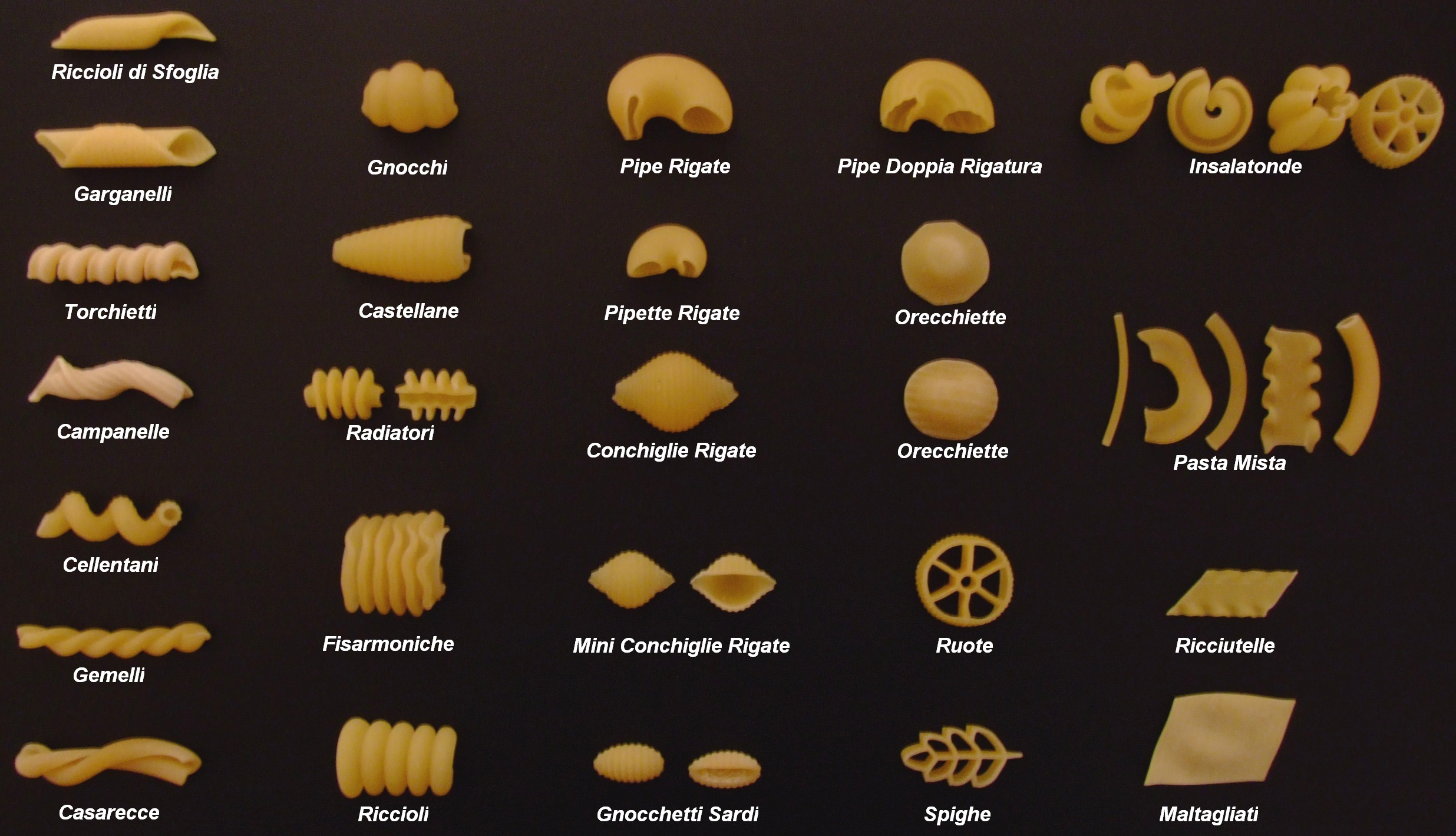 Quelle: selbst fotografiert, 11/2006 Fotograf: Späth Chr.